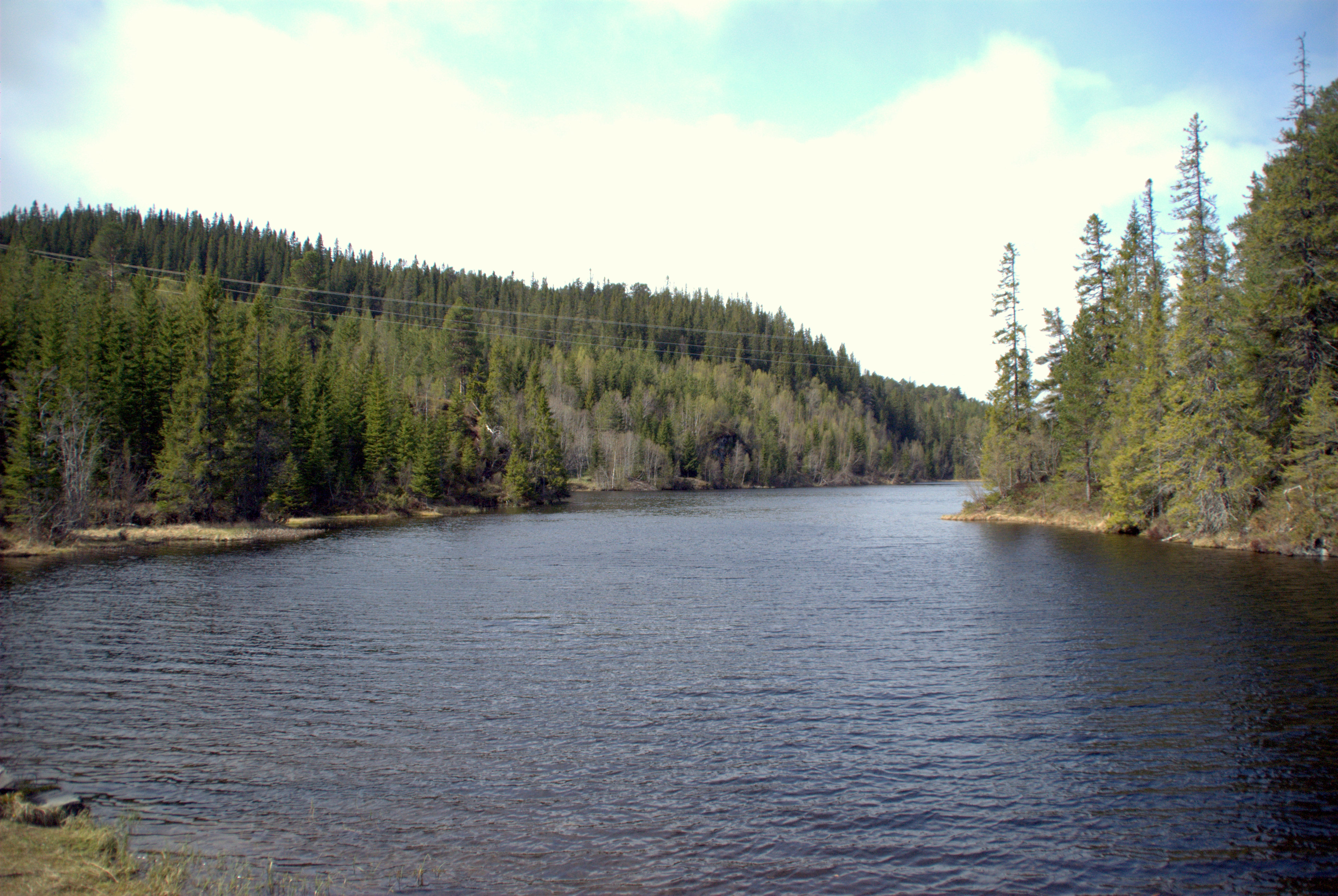 Holstdammen i Bymarka ved Trondheim, sett mot nord.